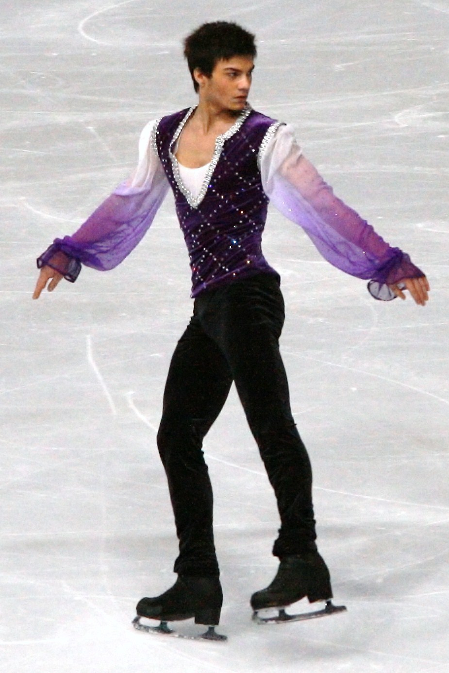 Роман Понсара на 2011 Trophée Eric Bompard